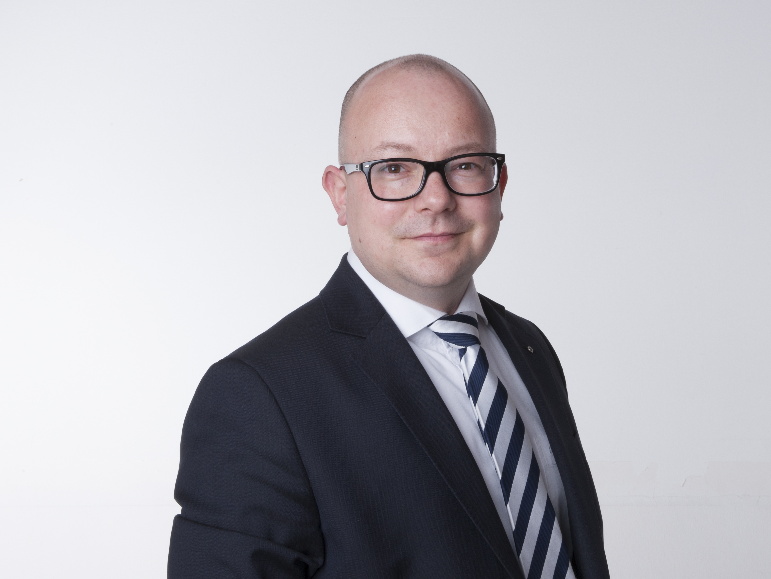 Frank Müller-Rosentritt, MdB